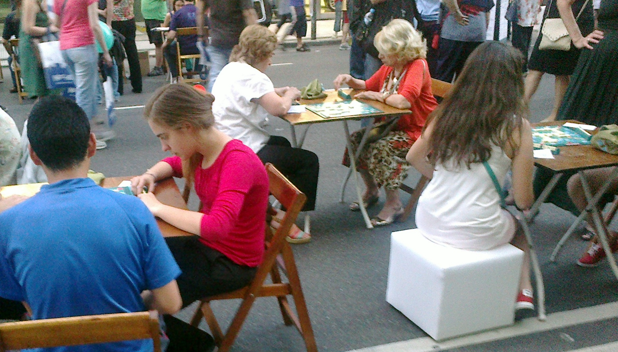 Difusión del Scrabble en la Argentina, a cargo de la Asociación Argentina de Scrabble, en Av. Corrientes entre Callao y Rodríguez Peña, Buenos Aires, durante "La Noche de las Librerías".